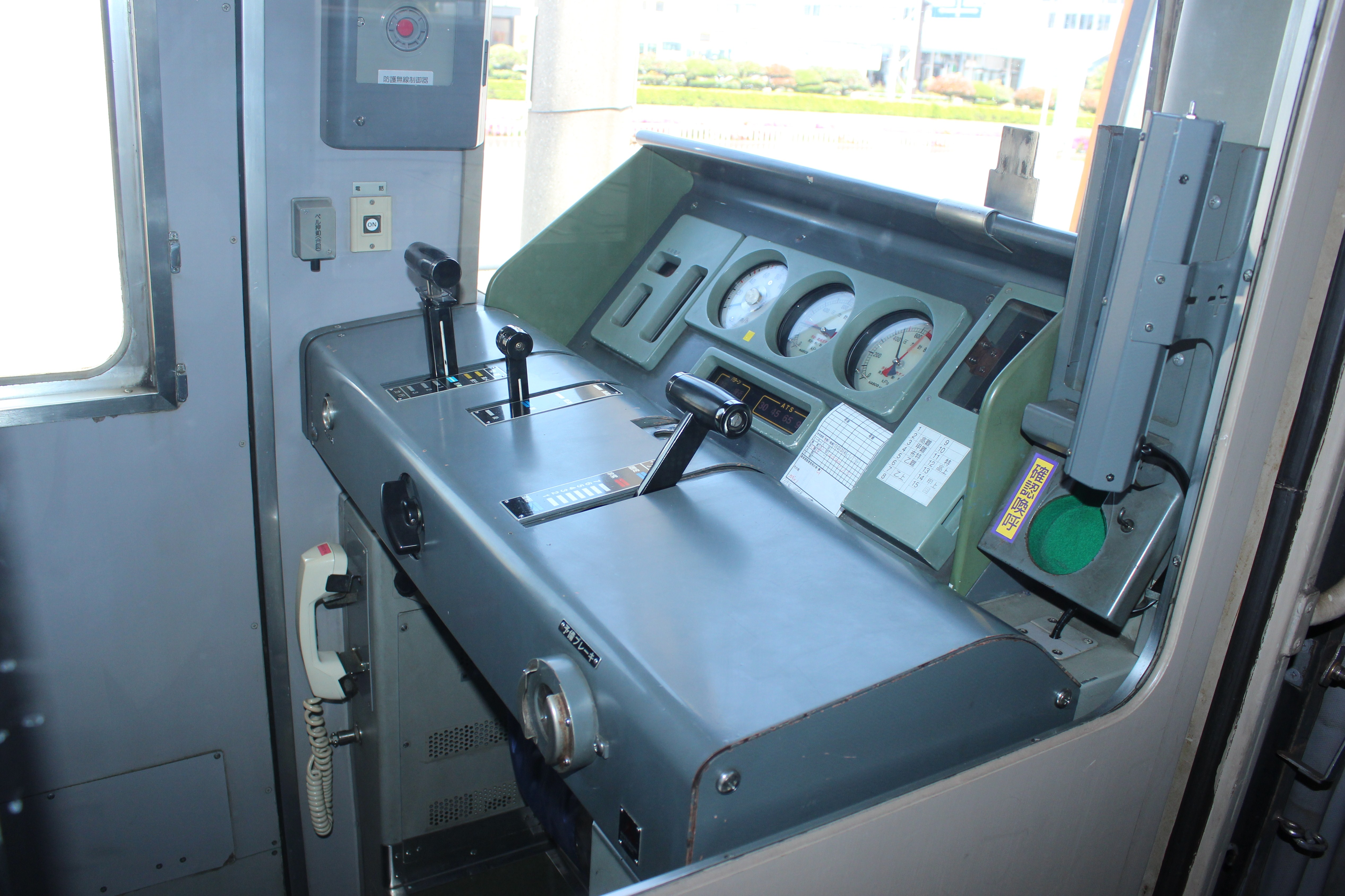 近鉄22000系運転台